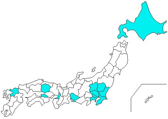 TXNのエリアを色づけしたもの。